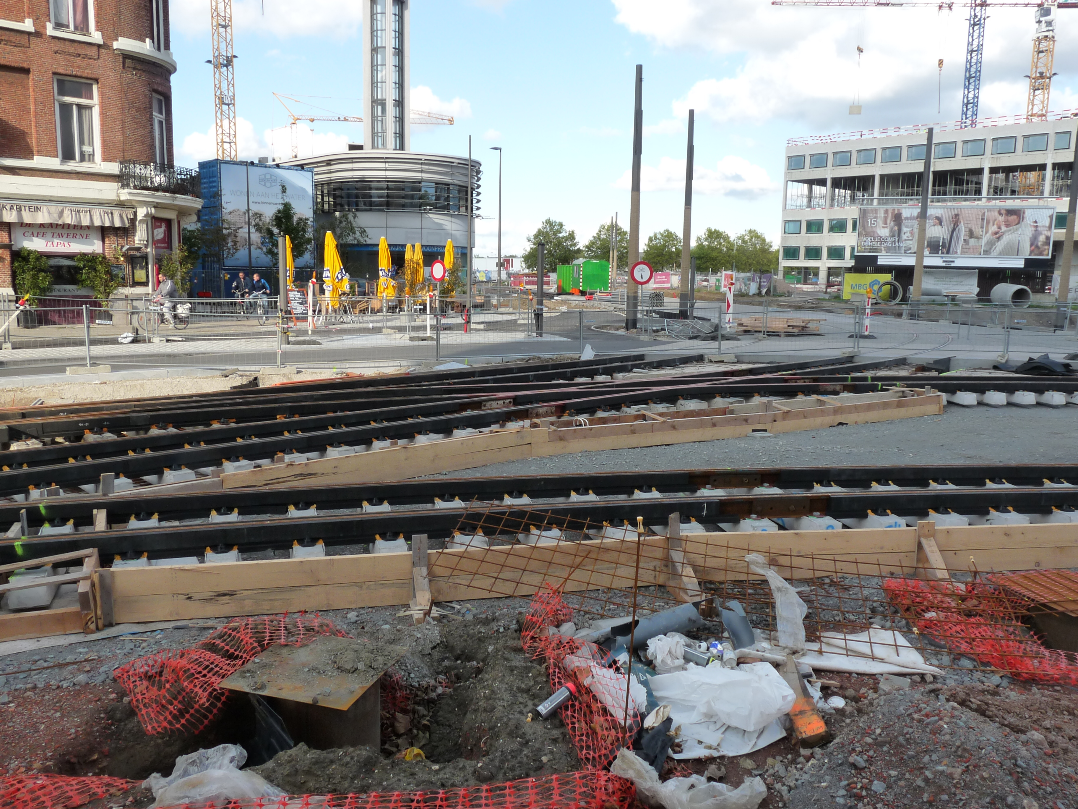 Tramspooraanleg bij de driehoeksaansluiting Londenstraat, Belgiëlei en de Noorderlaan (die verlegd gaat worden.